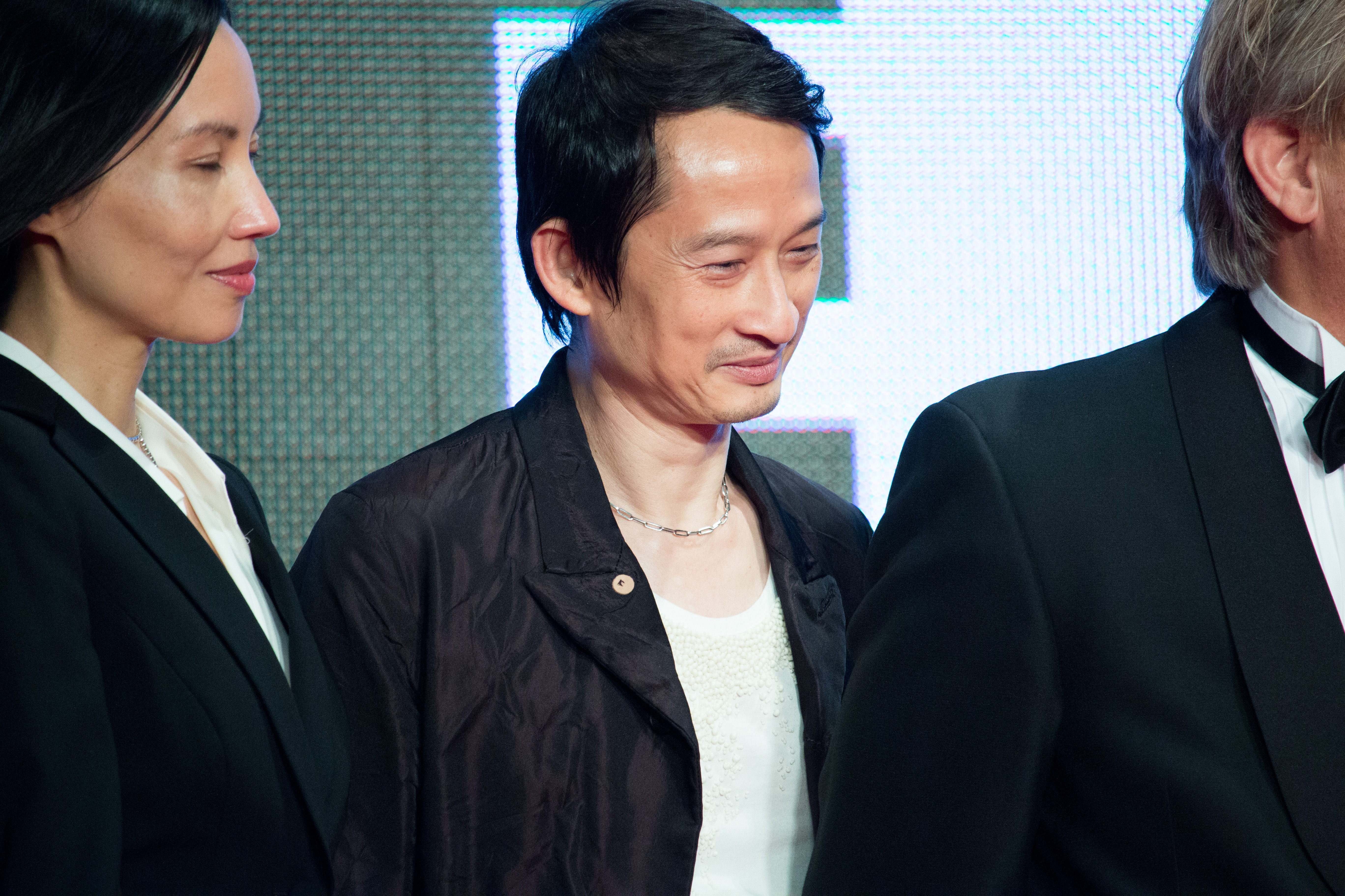 第28回 東京国際映画祭 オープニングセレモニー トラン・アン・ユン (審査員)